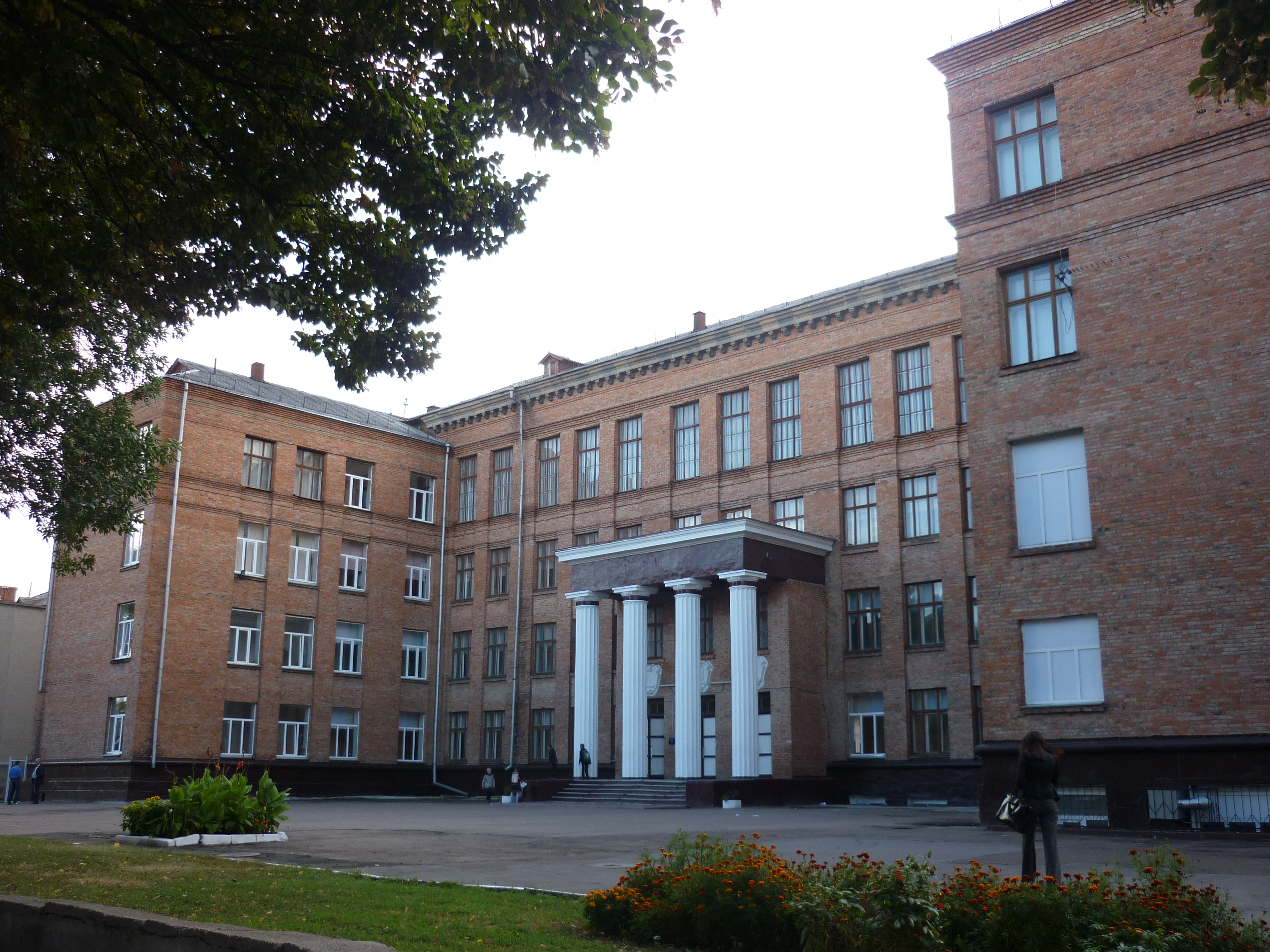 Спеціалізована школа №17, місто Черкаси